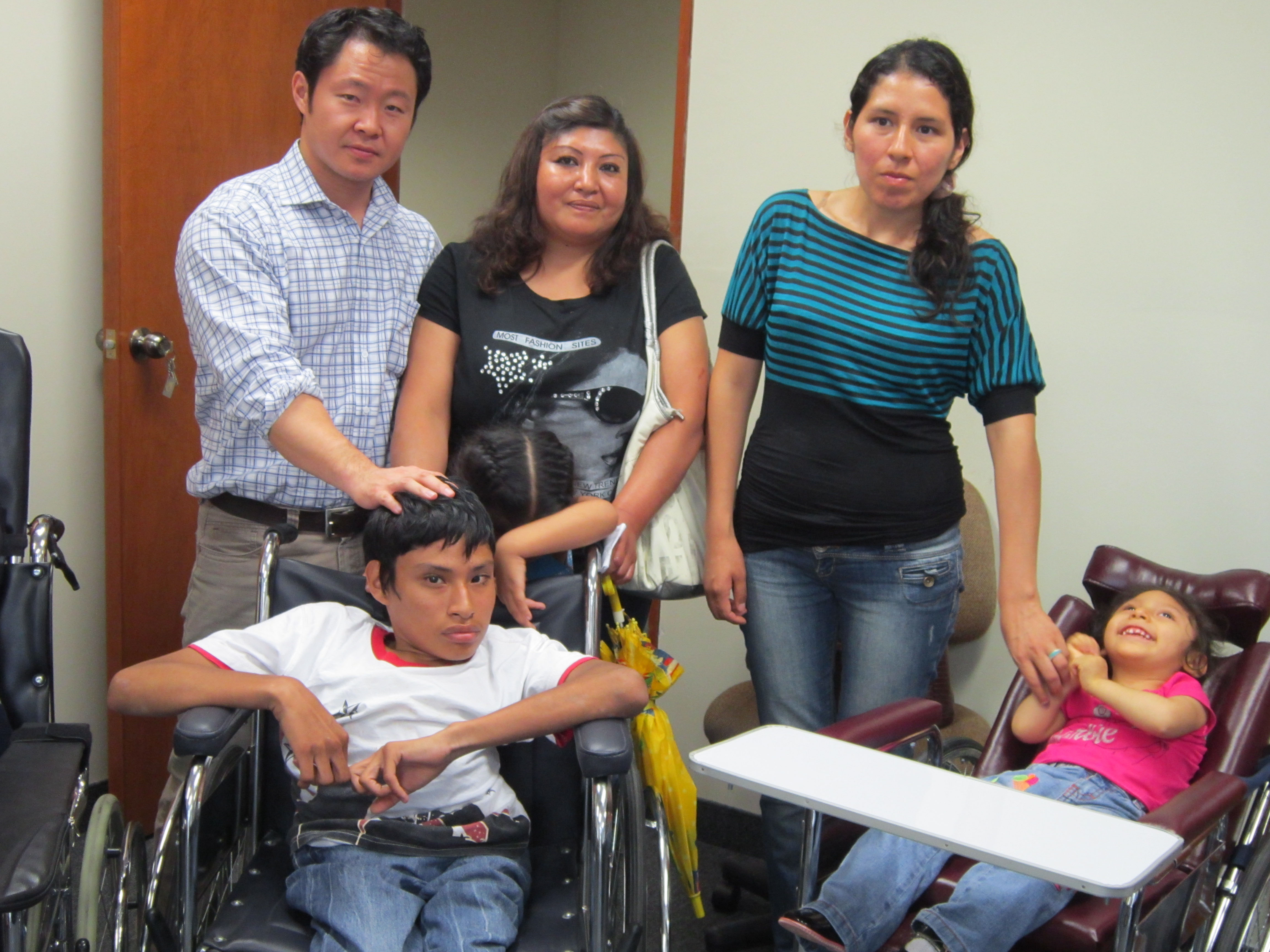 Con el fin de darles una mejor calidad de vida, el congresista Kenji Fujimori Higuchi (GPF) donó, el miércoles 25, tres sillas de ruedas neurológicas a igual número de niños que padecen de males congénitos. Hasta el despacho del parlamentario llegaron Jemima Pacheco Bellido (2), que sufre de parálisis cerebral; Junior Cervantes Medina (15); con parálisis cerebral severa y Brando Villegas (17), con espina bífida, quienes estuvieron acompañados por sus respectivas progenitoras.